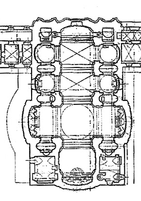 поземний план костелу